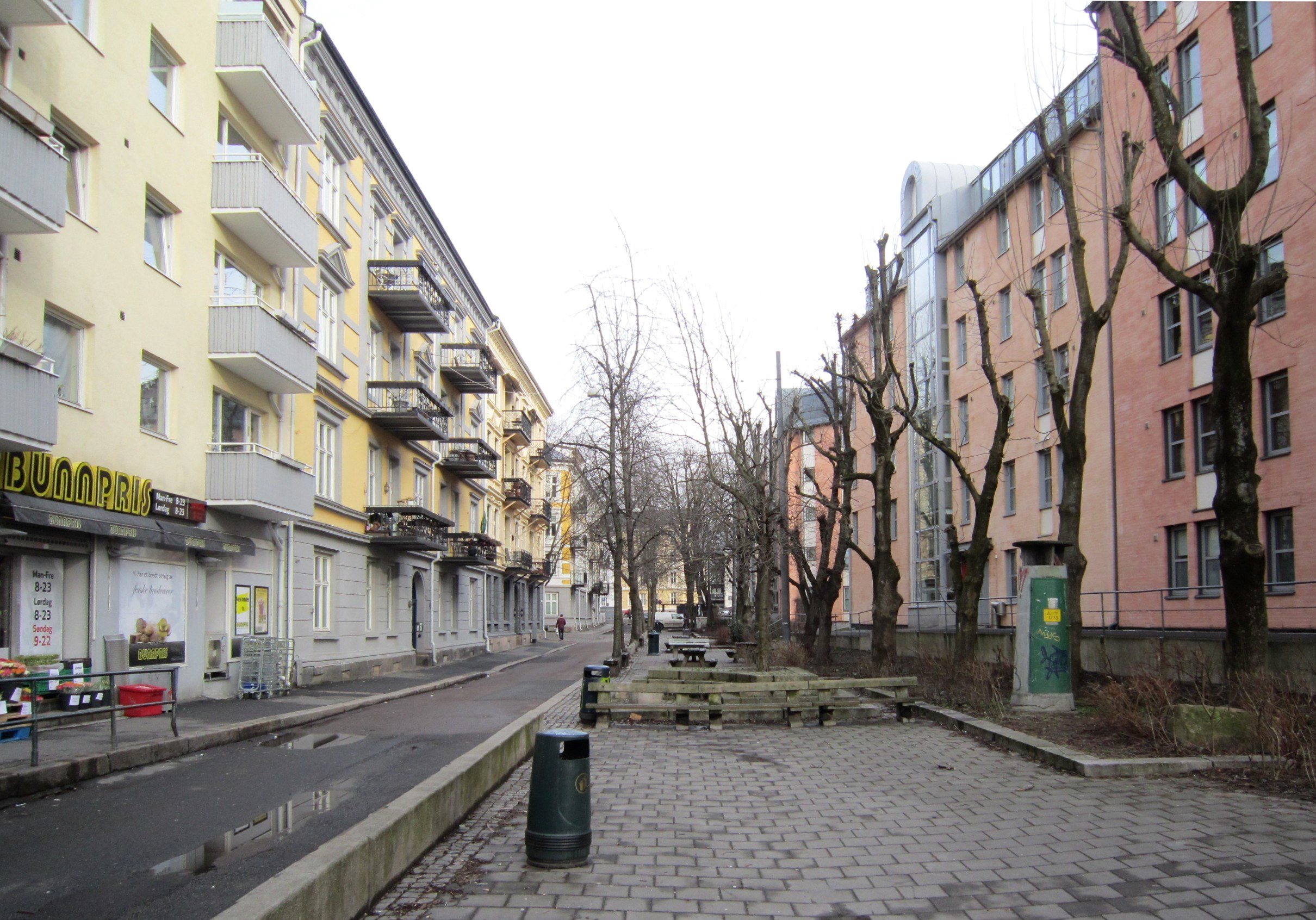 Lassons gate på Ruseløkka i Oslo